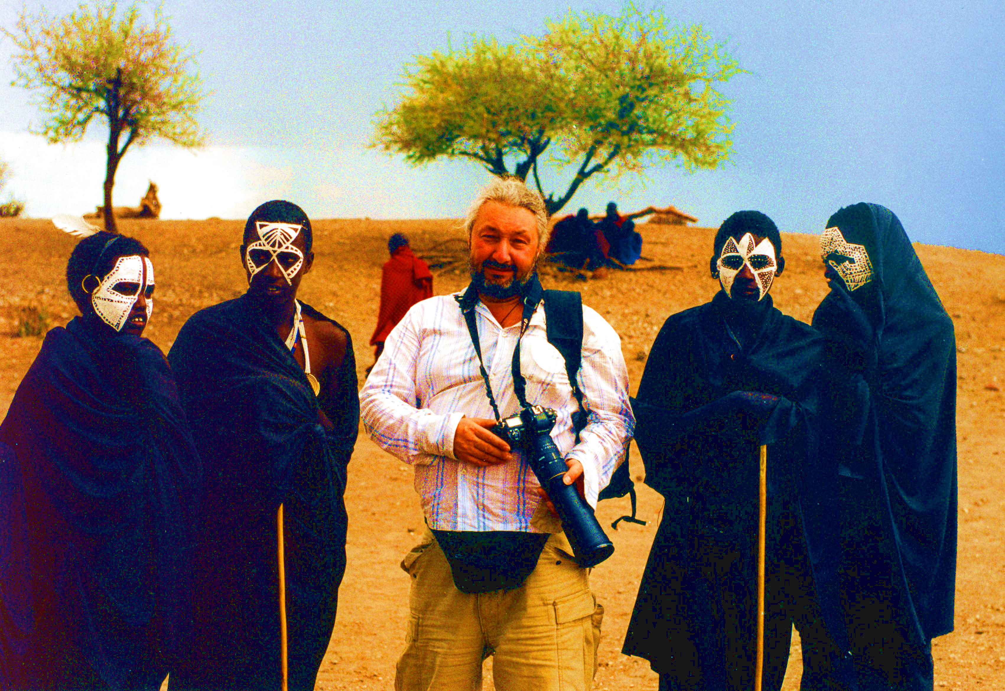 Стас Намин и масаи